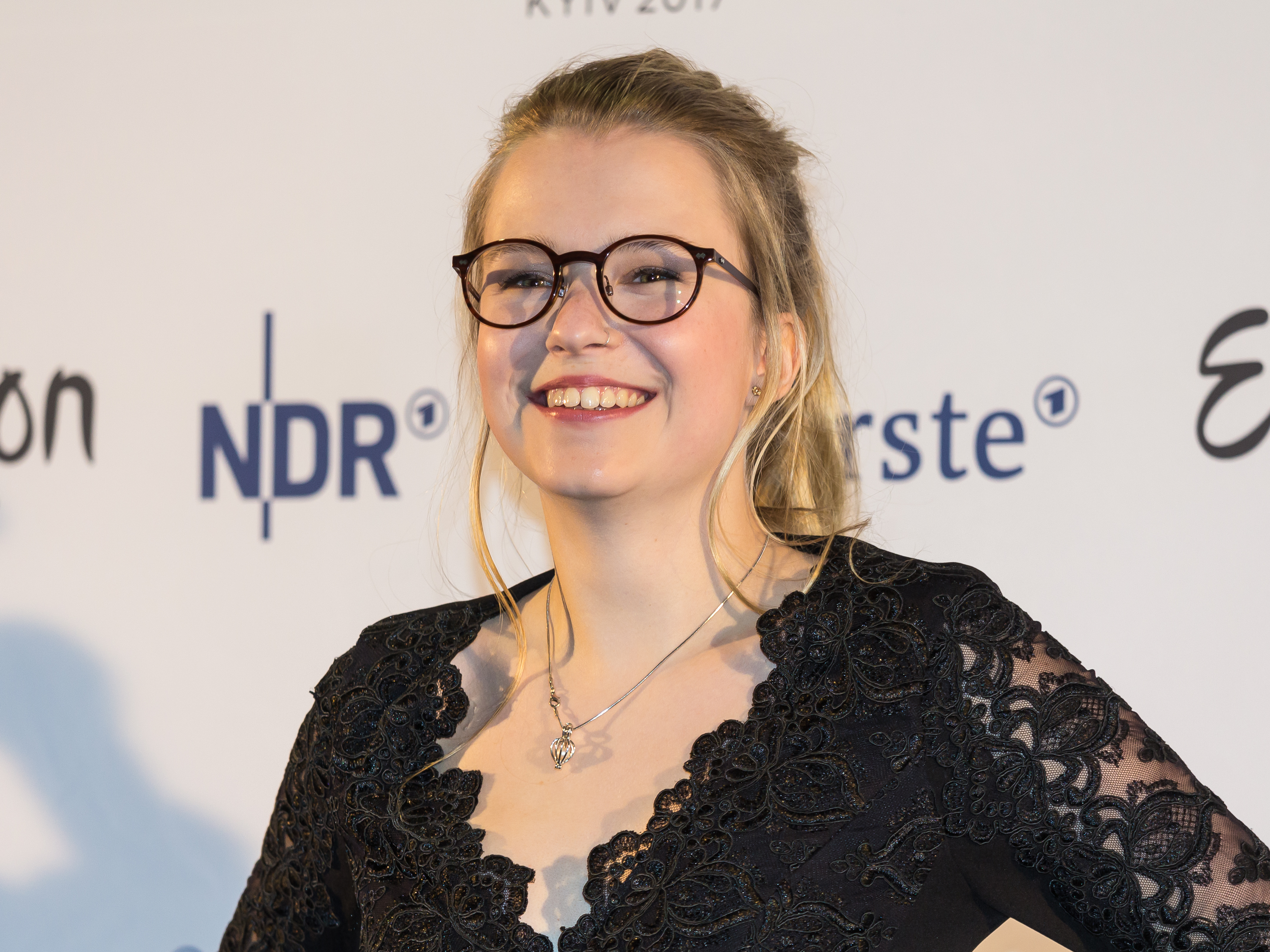 Unser Song 2017 - Pressekonferenz - Helene Nissen